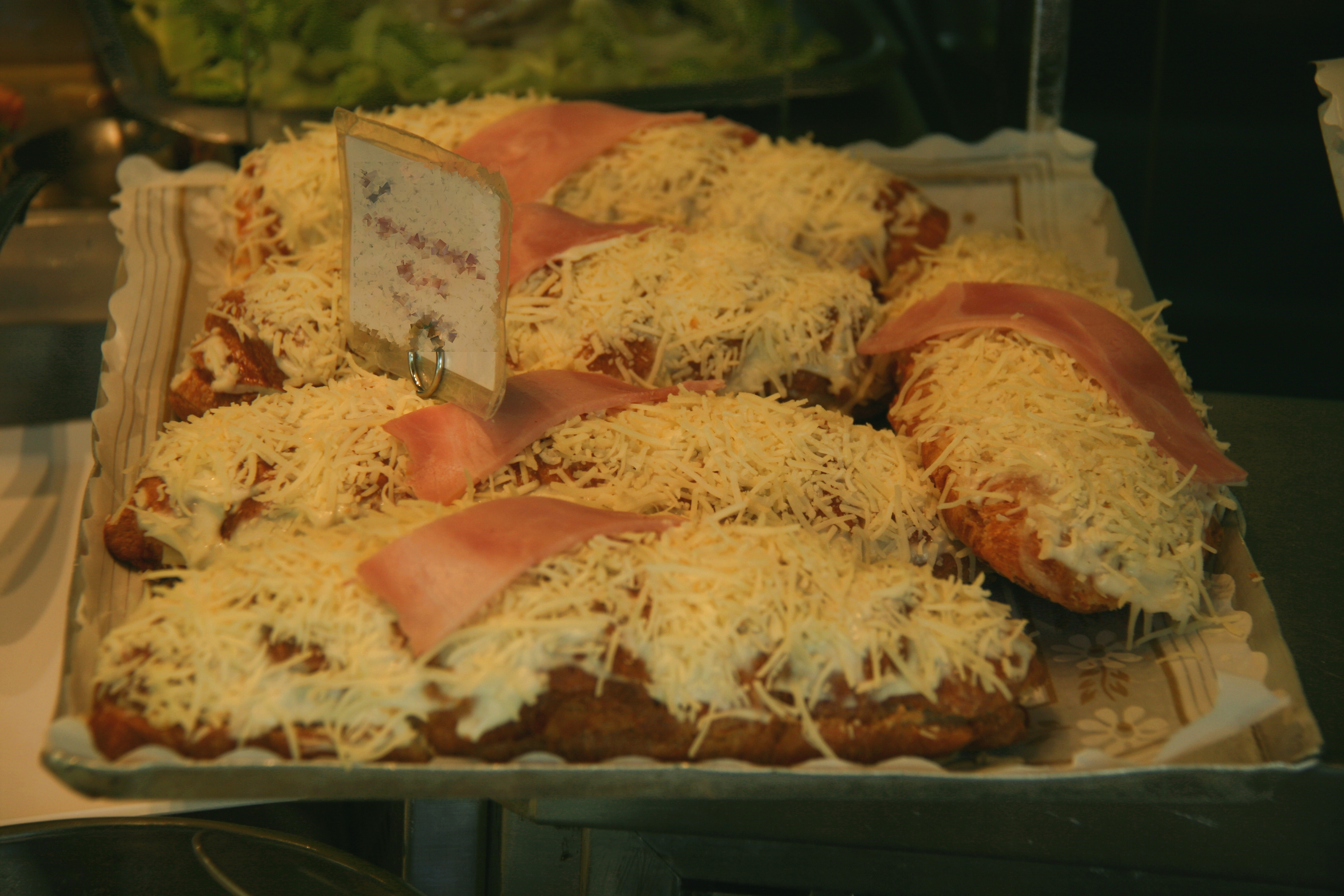 Crosisant francés relleno de jamón y queso - somosierra - Madrid